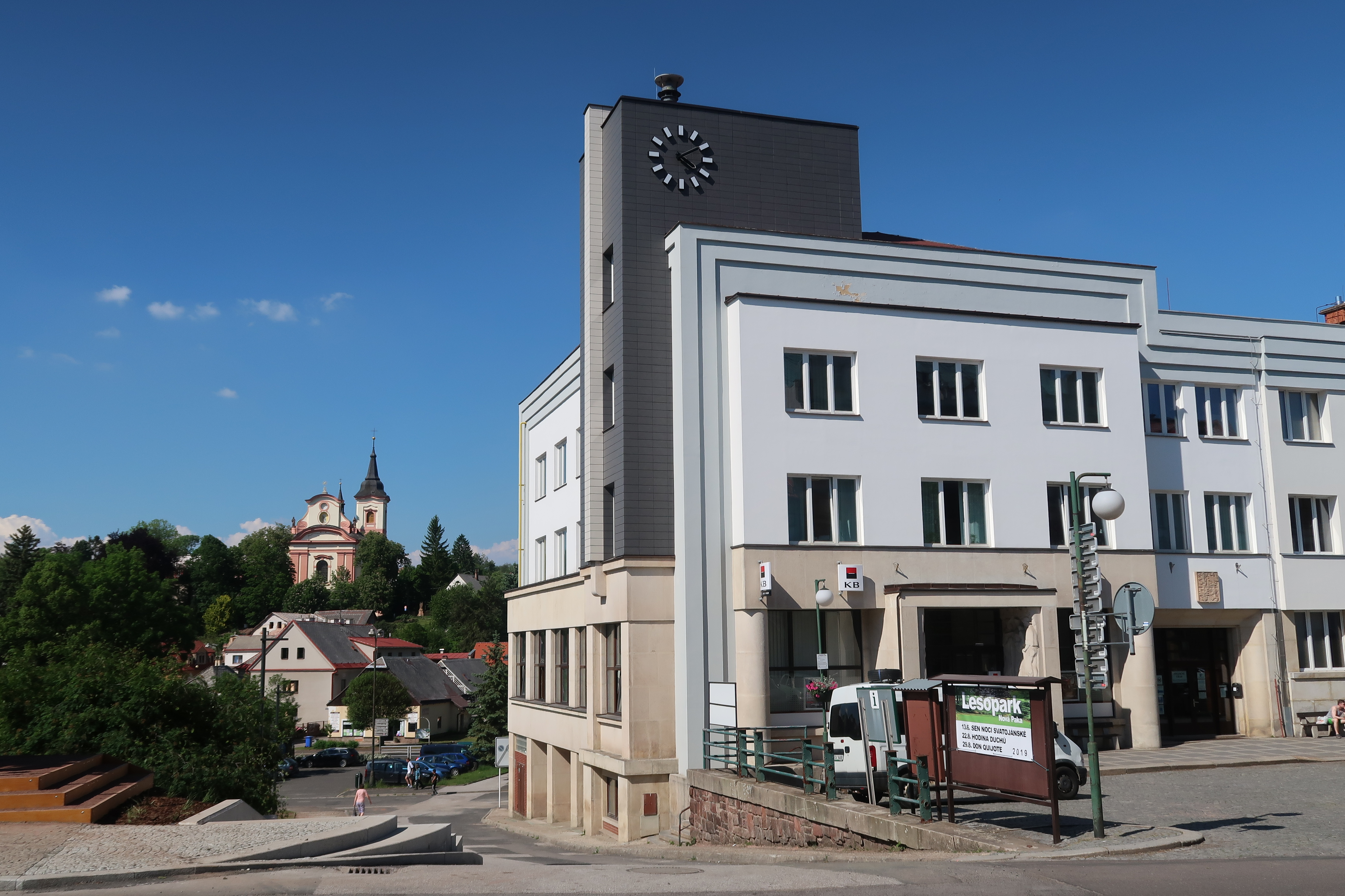 Městská spořitelna v Nové Pace (1930-1934), Masarykovo náměstí 1.